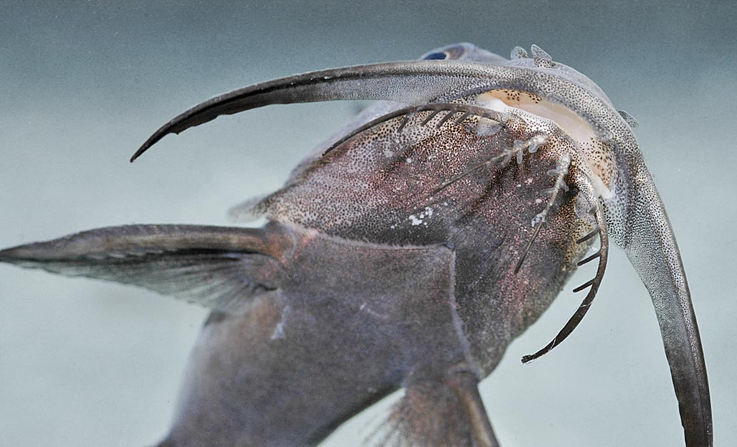 Hemisynodontis membranaceus, Maul